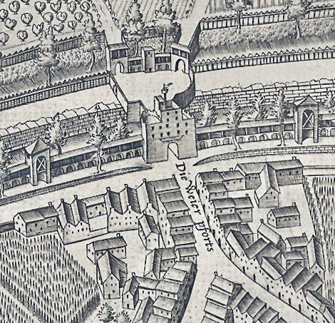 Ausschnitt des Mercator - Stadtplanes, Bereich Weyertor und Bastion, Stadtmauer Köln